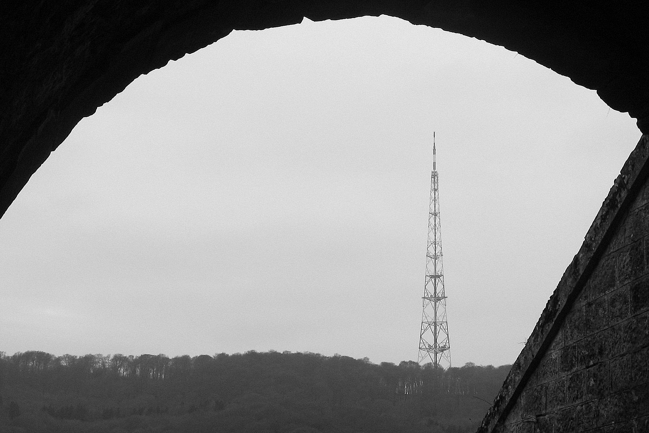 Emetteur de Dudelange, vue depuis le passage inférieur d'un pont de la voie de chemin de fer, à proximité du site